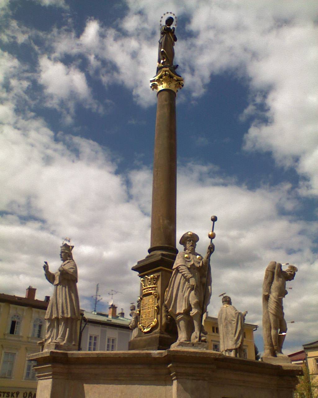 Hostinné.